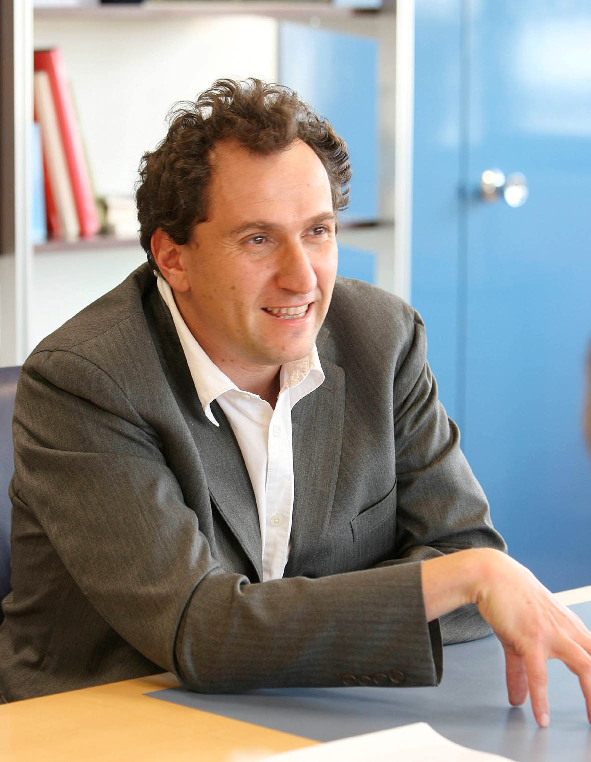 Vincent Feltesse, mai 2008